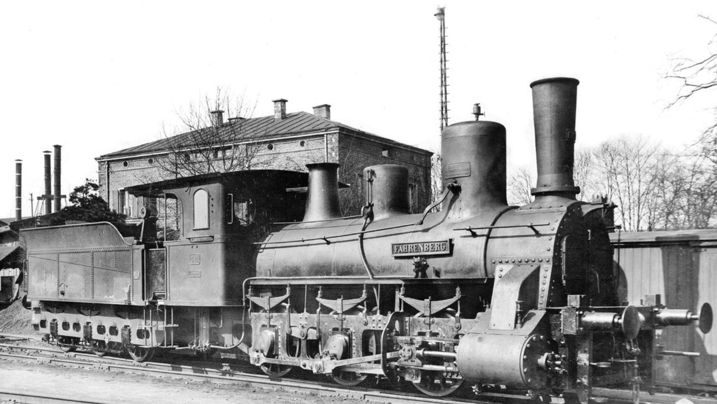 Damplokomotive des Typs Bayerische C III (Normalbauart), Nr. 600 Fahrenberg in München